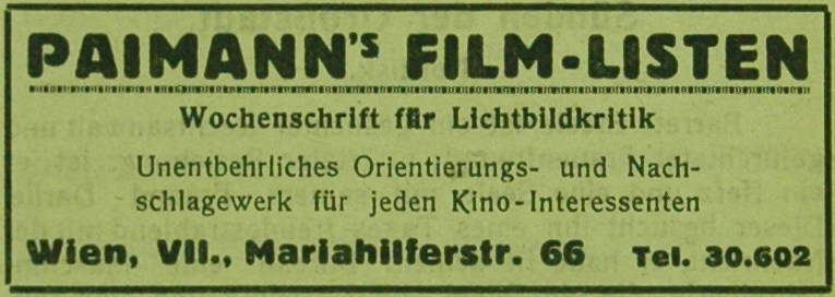 Inserat des Wiener Filmmediums "Paimann's Filmlisten" in der Wiener Filmzeitschrift "Das Kino-Journal" (en: advertising for the Viennese film information paper "Paimann's Filmlisten" in a film-magazine)